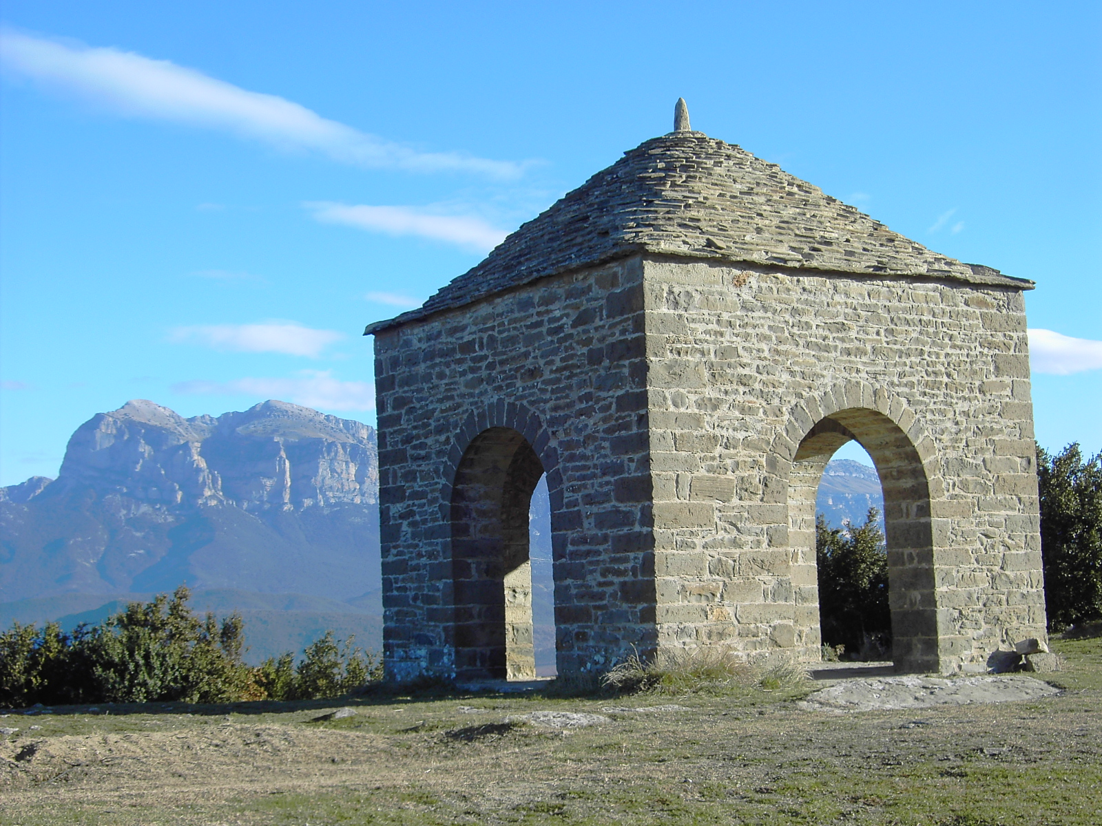 El esconjuradero de Guaso (Huesca), recientemente restaurado. Es uno de los ejemplos más conocidos de este tipo de construcción religiosa única de los pirineos aragonés y catalán.